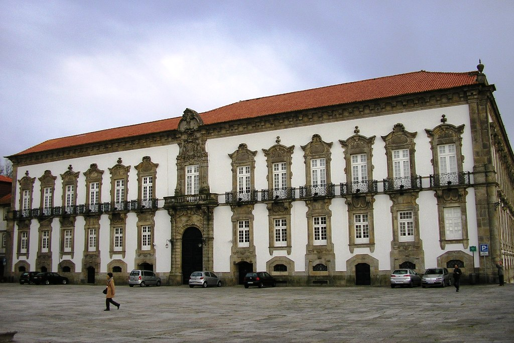 "Paço Episcopal" in Porto, Portugal. Author: Manuel de Sousa.